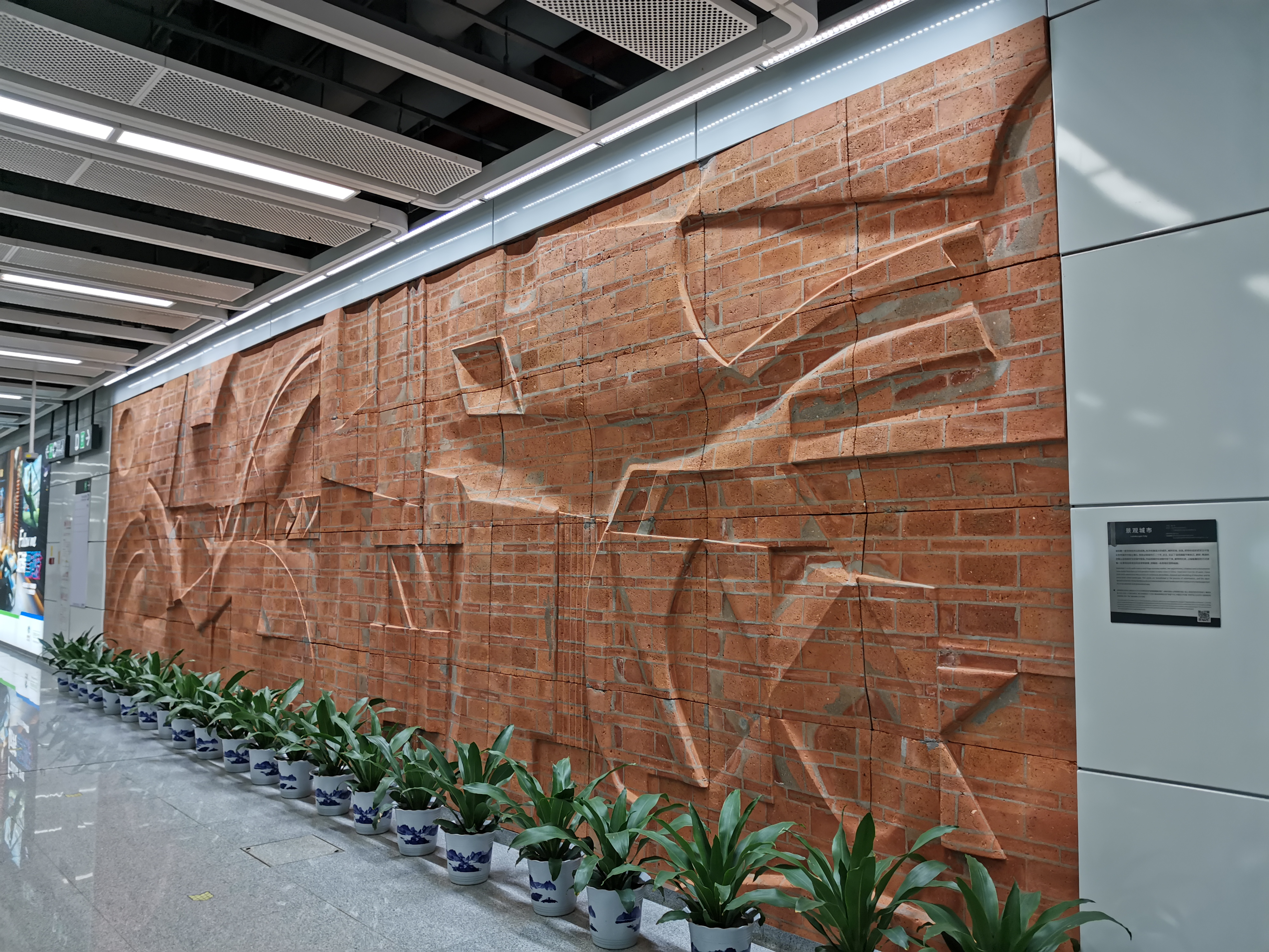 梦海站艺术墙，以砖瓦纹理为主